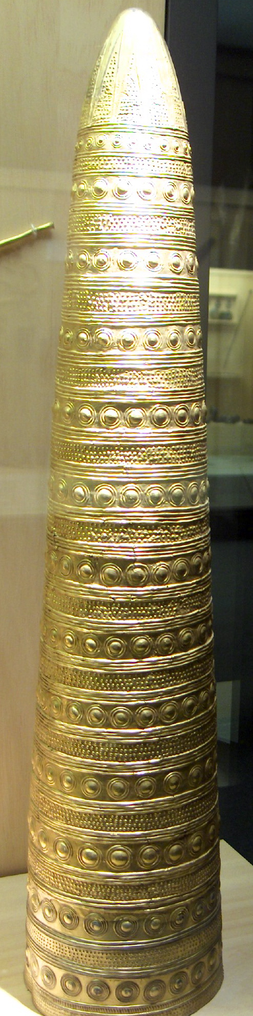 "Cône d'Avanton", or, âge du bronze, 1500-1250 av. JC, musée des antiquités nationales, Saint-Germain-en-Laye